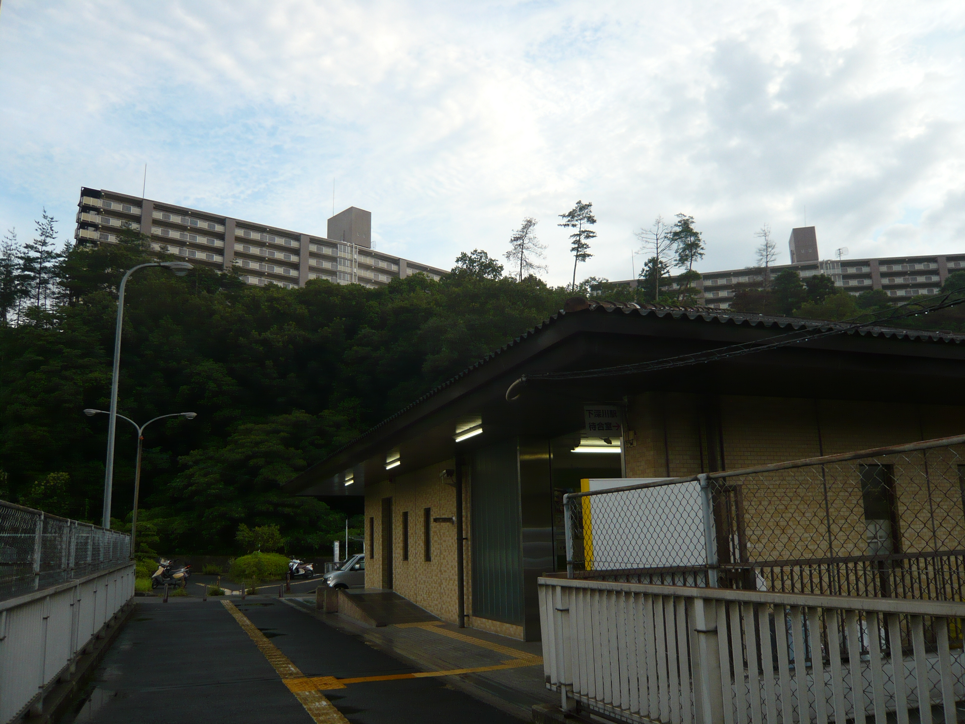 芸備線下深川駅前